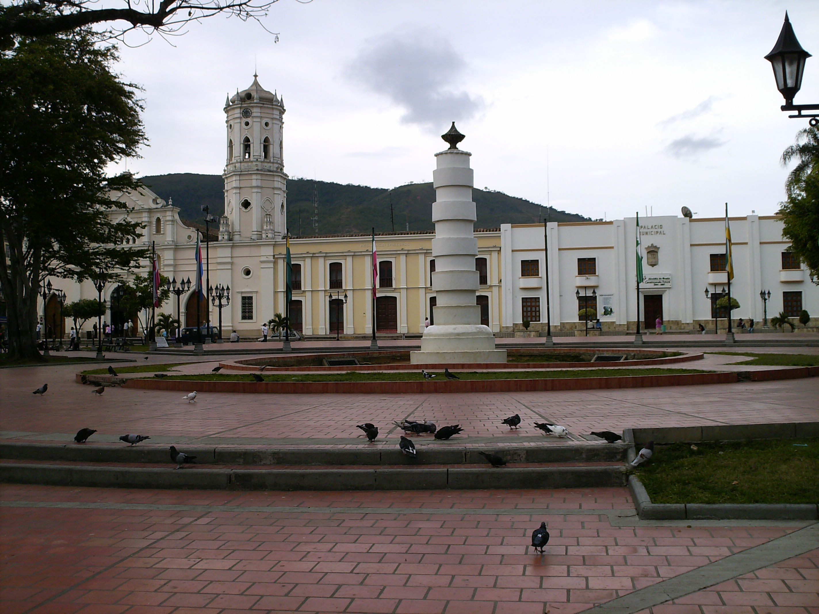 Columna de la Libertad de los Esclavos